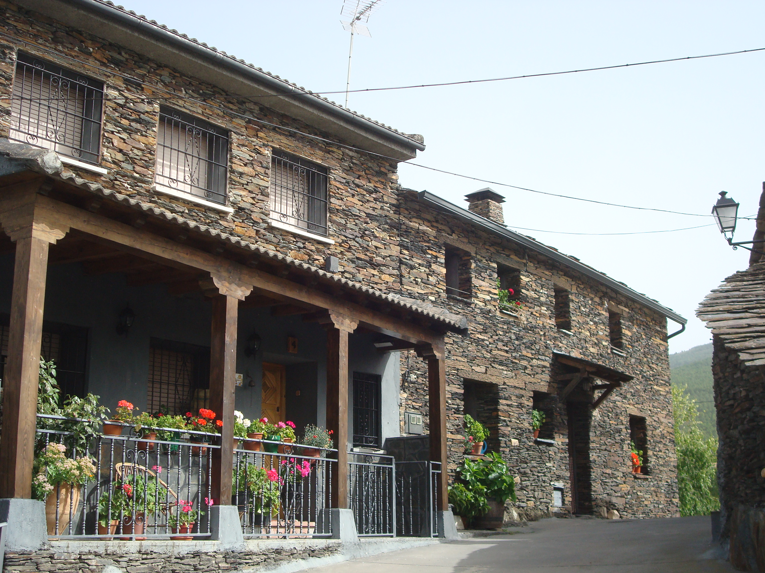 Campillejo - (Campillo de Ranas) - 005